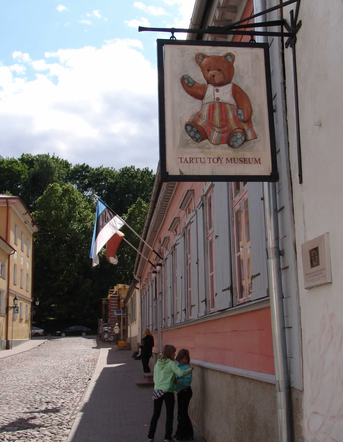 Im Spielzeugmuseum von Tartu gibt es jede Menge zu lernen und entdecken.